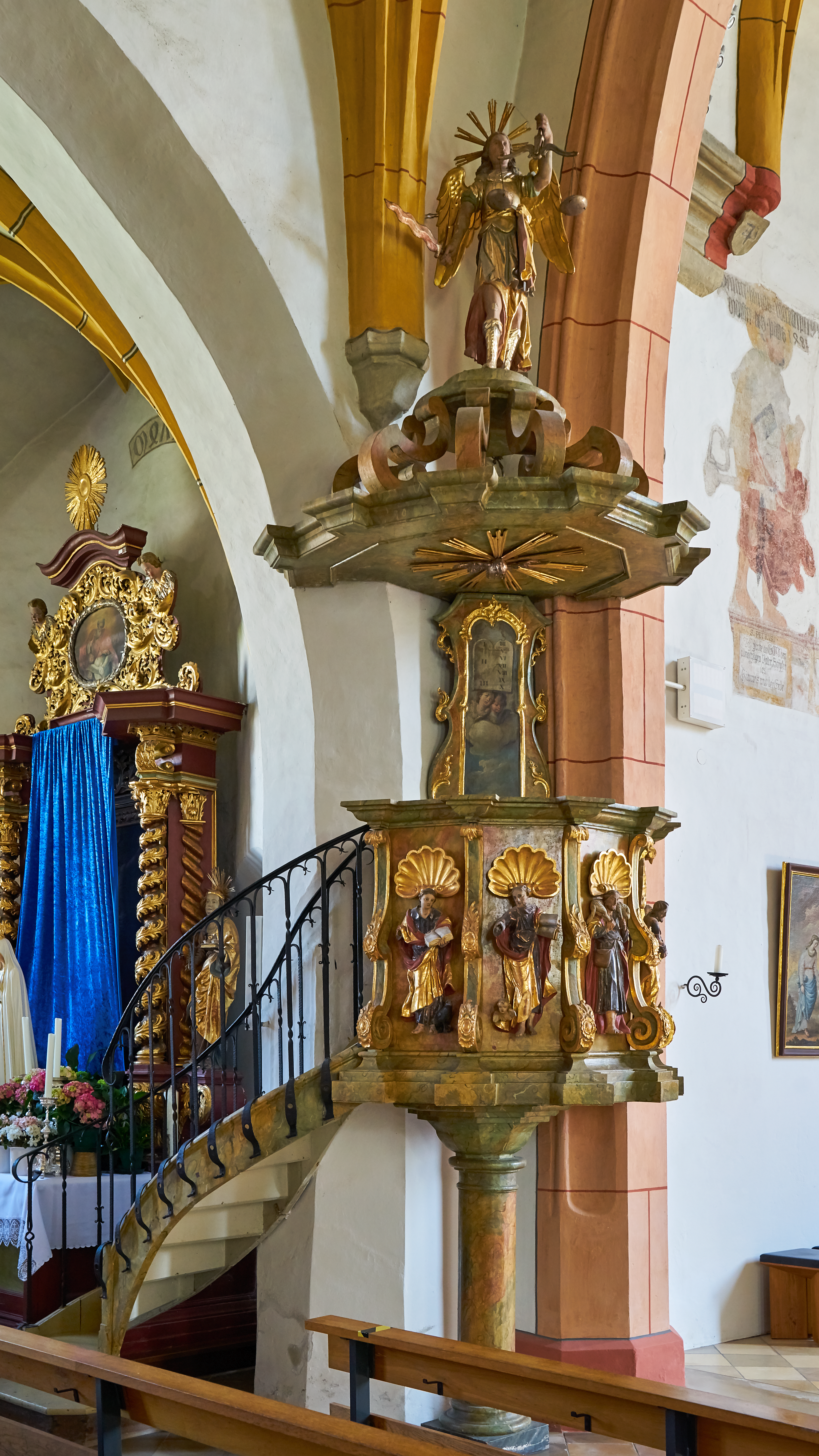 Pfarrkirche Mariä Himmelfahrt Rotthalmünster, die neubarocke Kanzel am linken Chorbogen